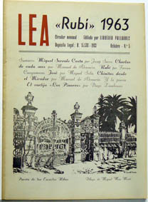 revista